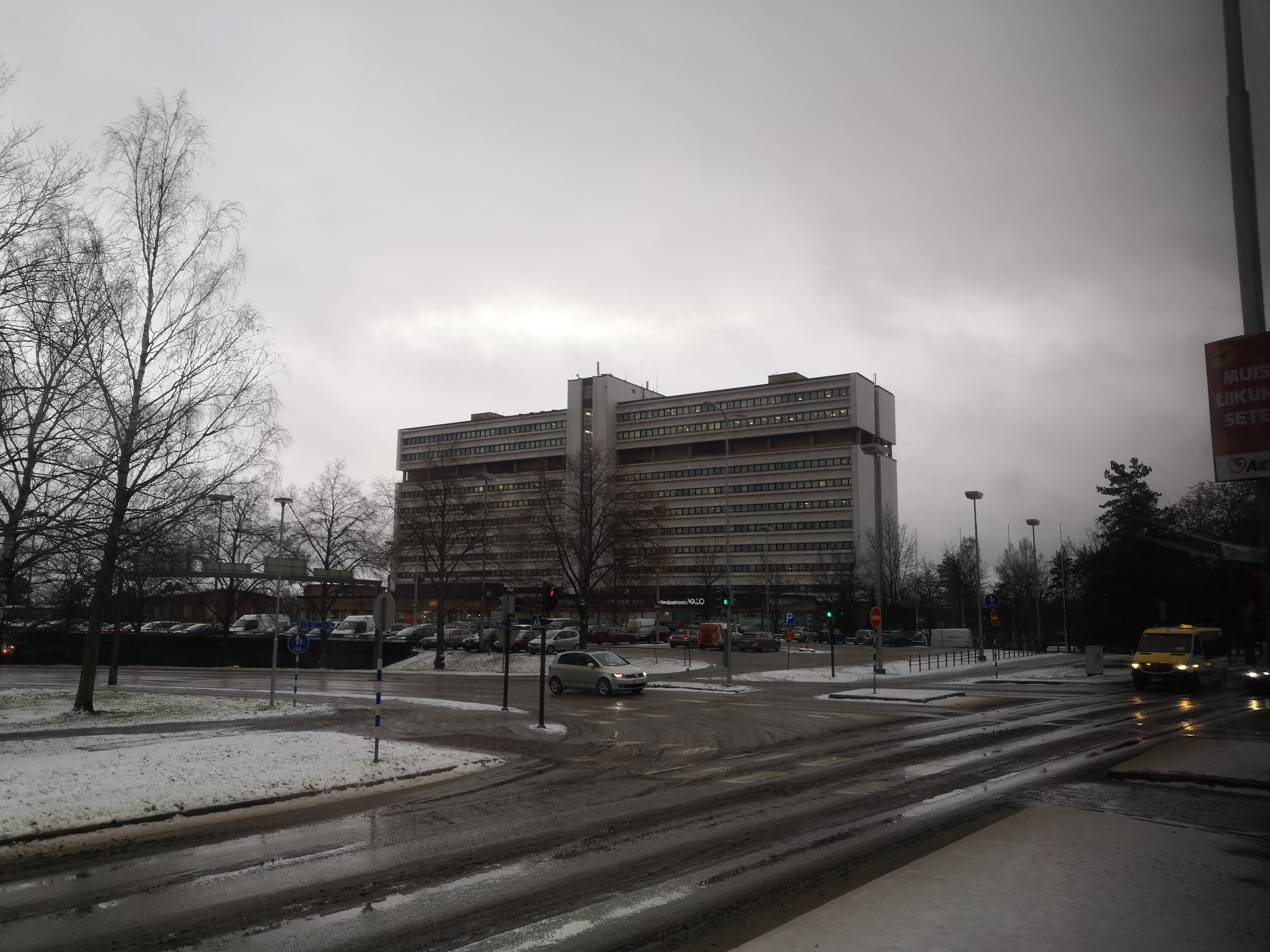 Kouvolan Pohjola-talo ja Vanha tori joulukuussa 2019